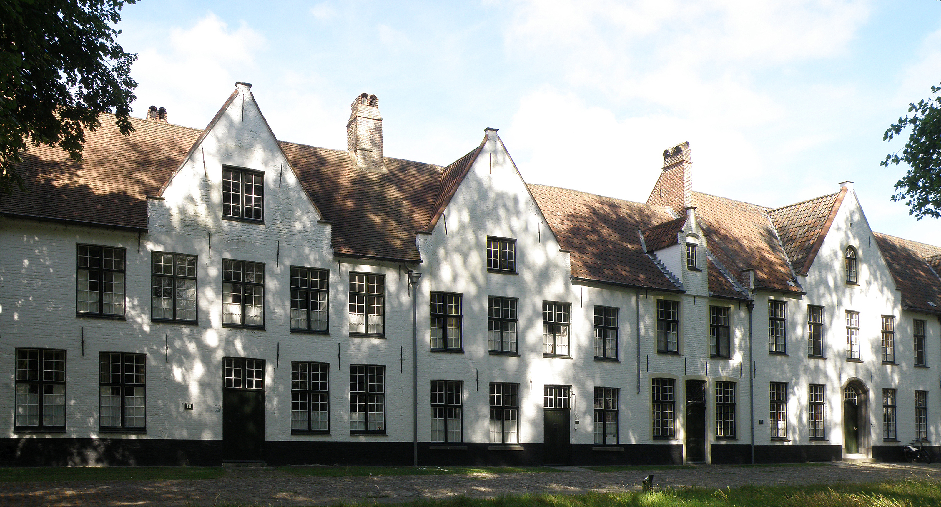 Begijnhof (Brugge). Begijnenhuizen nr. 22, 24, & 26.